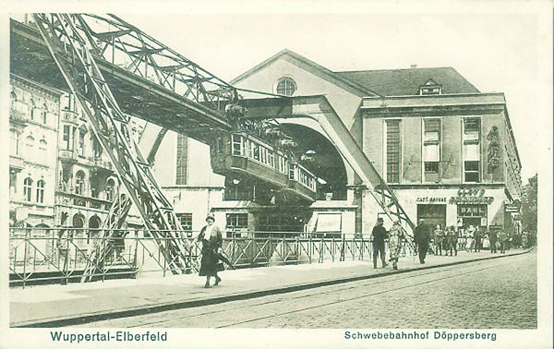 Schwebebahnhof Döppersberg mit Köbo-Haus in Elberfeld, Postkarte von 1932